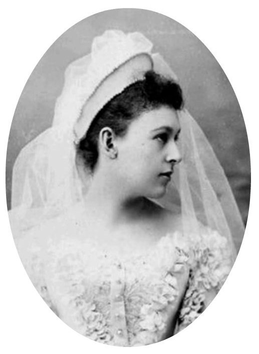 Княжна Леонилла Эммануиловна Мещерская (1871—1967), в первом браке за Дмитрием Сергеевичем Фёдоровым (1855—1908), в разводе в 1897 года. Во 2-м браке с 1898 года за Рихардом Адольфом фон Гернет (1863—1967).